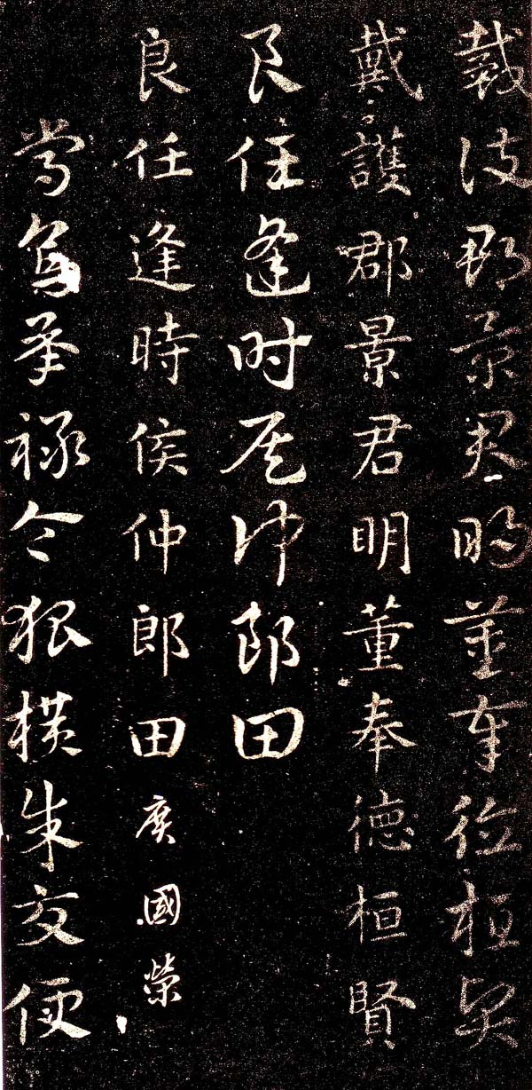 皇象的書法作品-急就章